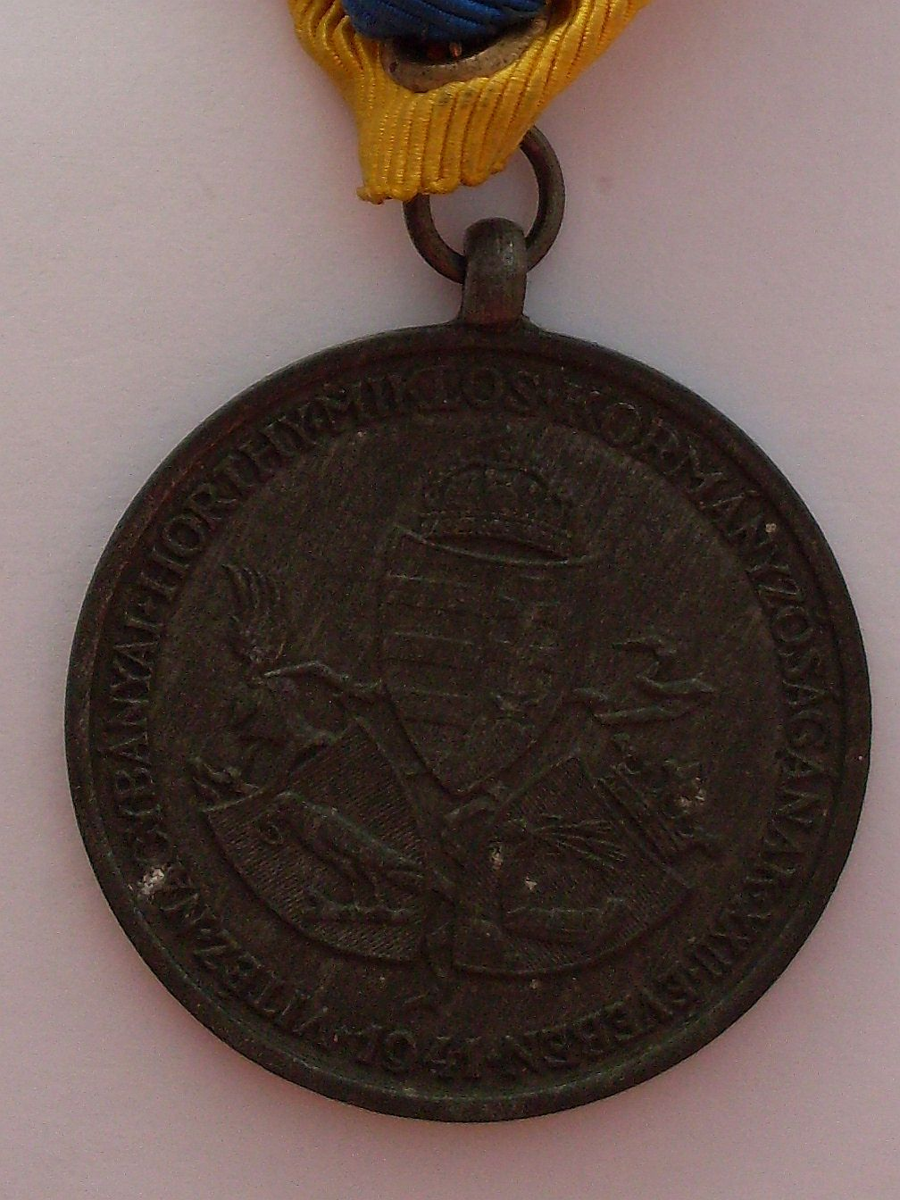 Erinnerungsmedaille an die Rückgewinnung Südungarns Revers